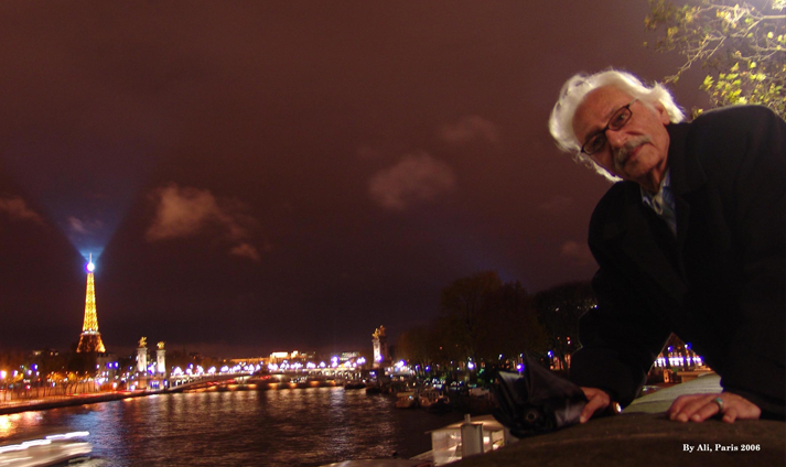 تصویر چهره جمشید مشایخی بازیگر سینما